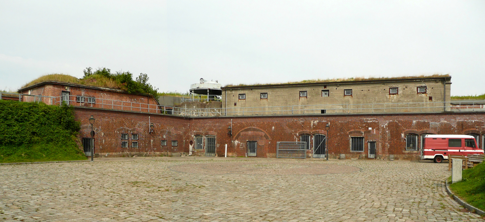 Innenhof von Fort Kugelbake